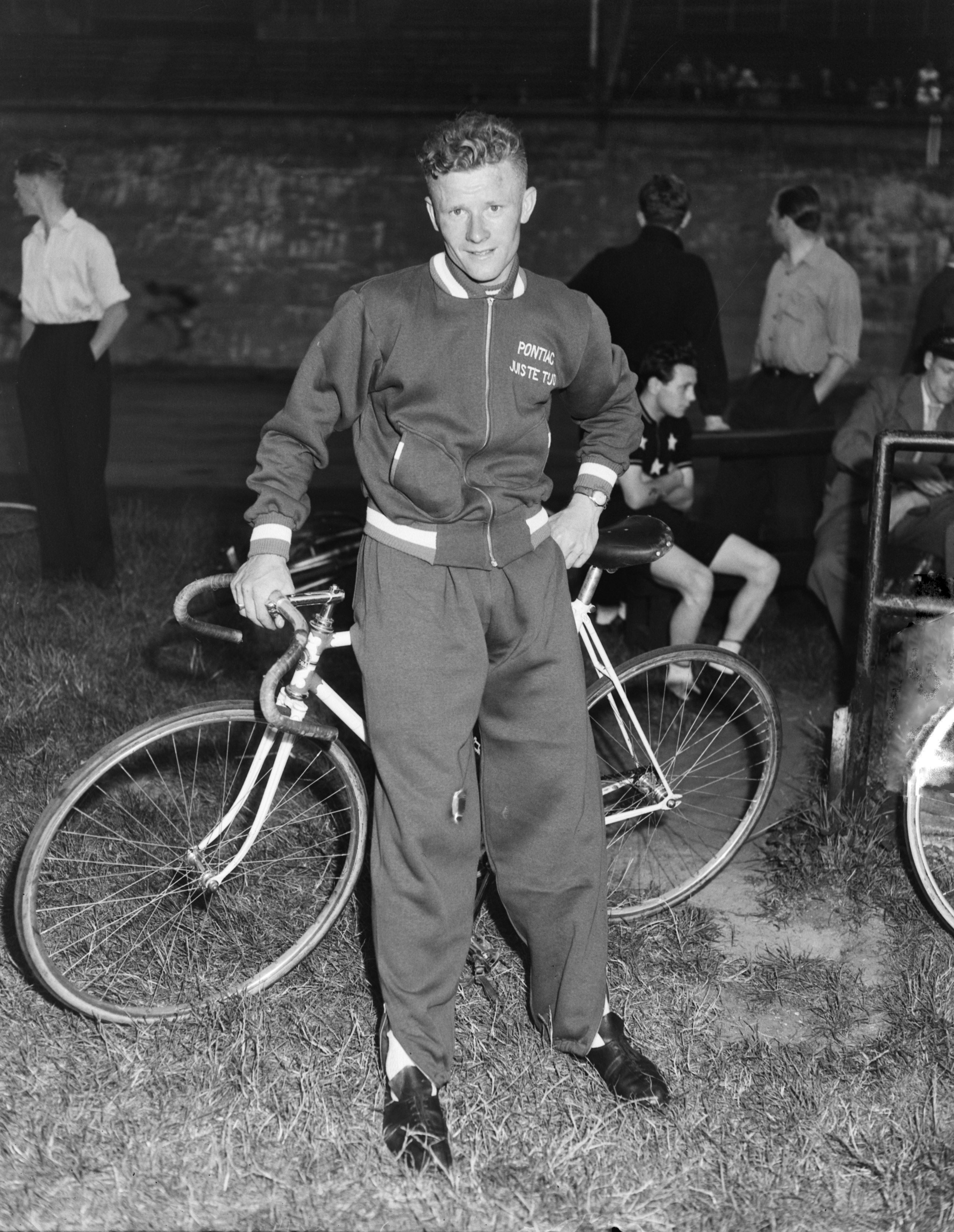 Collectie / Archief : Fotocollectie Anefo Reportage / Serie : [ onbekend ] Beschrijving : Tour de France. Ploeg in Olympisch Stadion. Nieuwe gezichten: Henk Stevens en Adrik Suykerbuyk Datum : 29 juni 1953 Trefwoorden : ploegen, stadions Persoonsnaam : Adrik Suykerbuyk, Henk Stevens Fotograaf : Duinen, […] van / Anefo Auteursrechthebbende : Nationaal Archief Materiaalsoort : Negatief (zwart/wit) Nummer archiefinventaris : bekijk toegang 2.24.01.04 Bestanddeelnummer : 905-8085